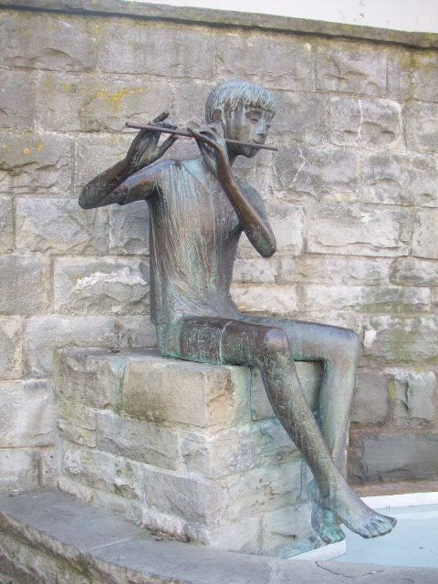 Flötender Knabe (Brunnenfigur) von Werner Gürtner, Meersburg, Bodenseekreis Flötender Knabe (Brunnenfigur) von Werner Gürtner Meersburg, Bodenseekreis